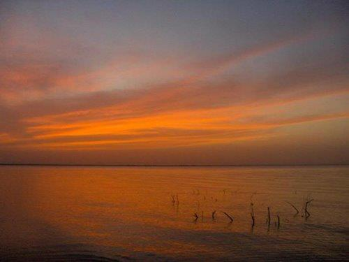 Represa Atardecer de Calabozo